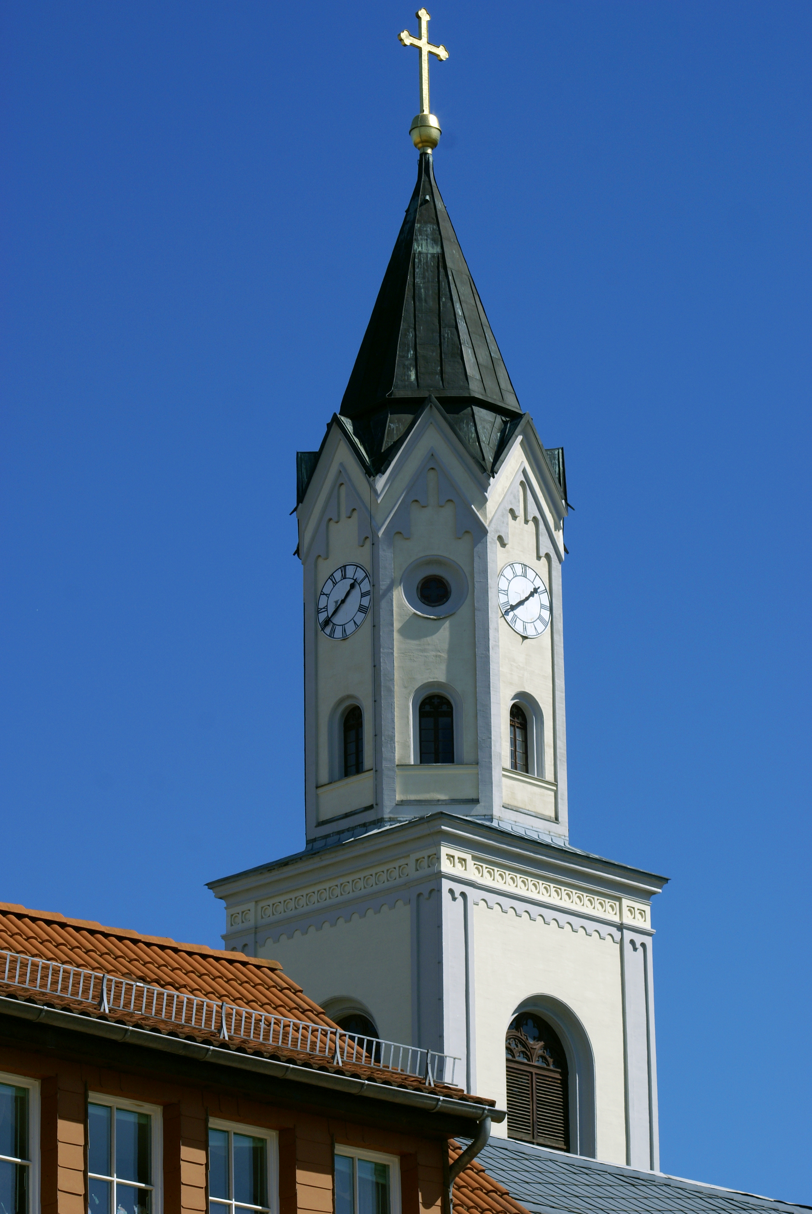 Blick zum Kirchturm der Laurentiuskirche in Elsterberg